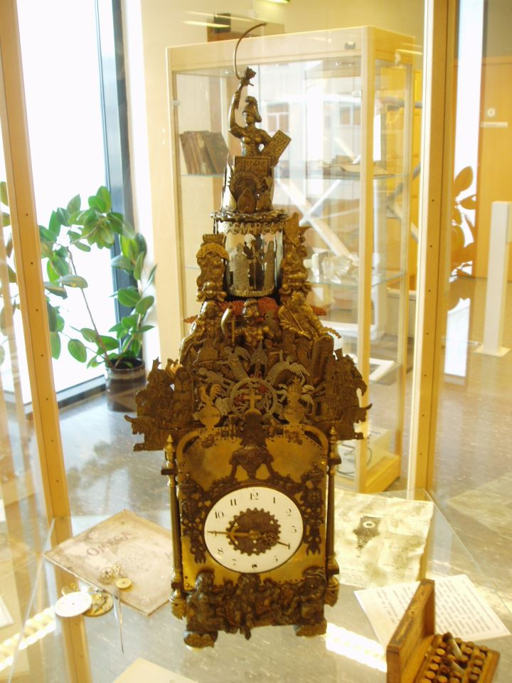 Pendulum Clock by Mauritz Kartevold